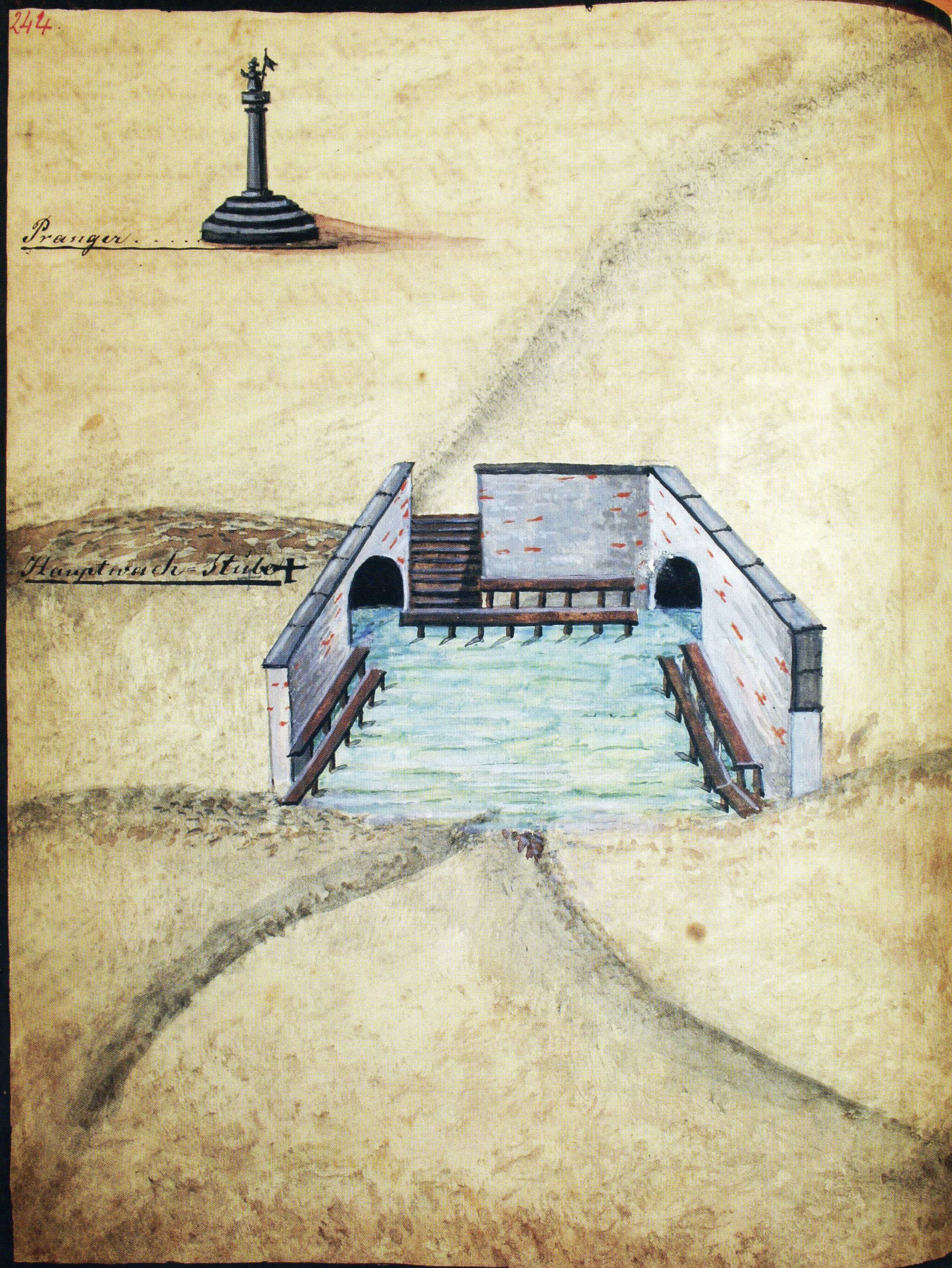 Původní podoba západního sestupu k Nečízu na náměstí Přemysla Otakara v Litovli; v pozadí také dnes již neexistující pranýř This file was uploaded during the project of WikiTown Litovel.